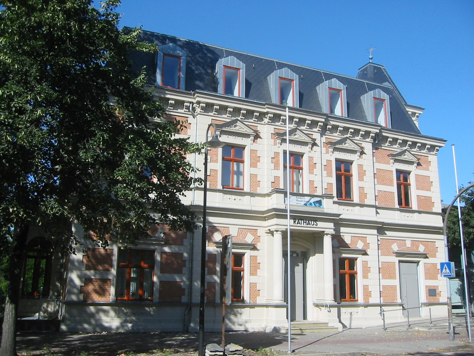 Rathaus von Erkner, einer Gemeinde in Brandenburg